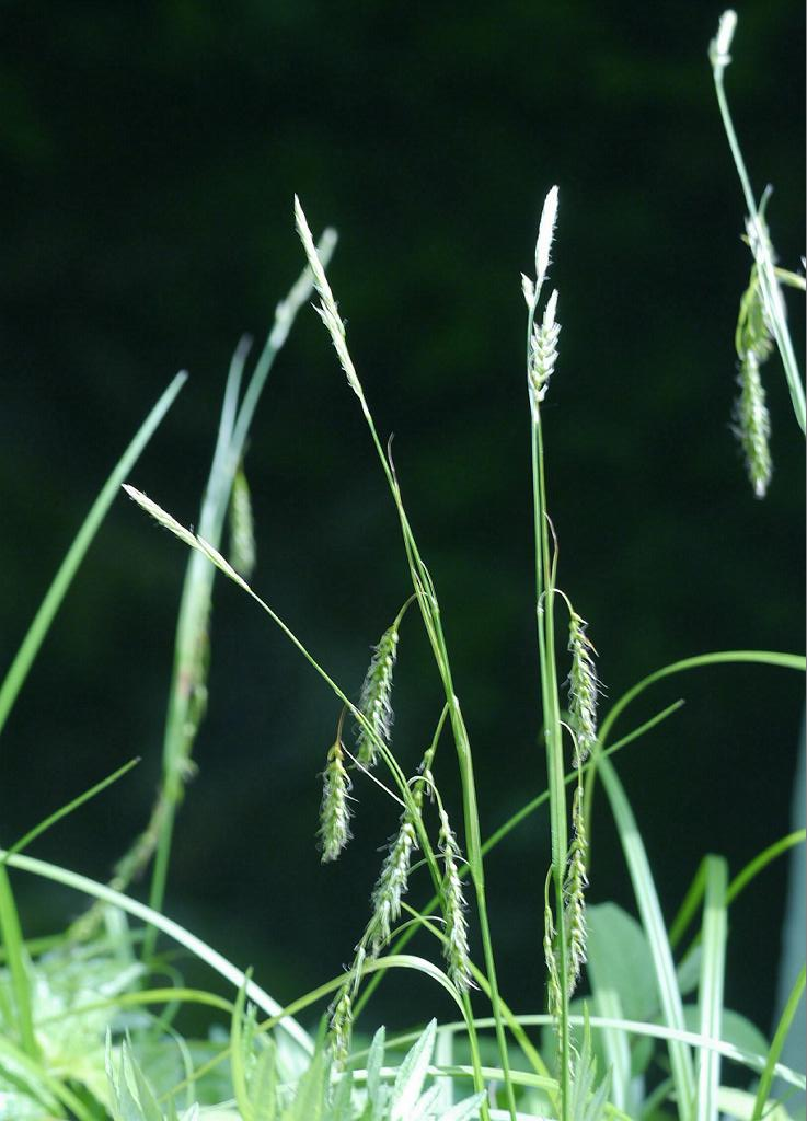 Carex hondoensis：アイズスゲ 2018/06/06 福井県九頭竜渓谷：Hukui Pref. Japan.